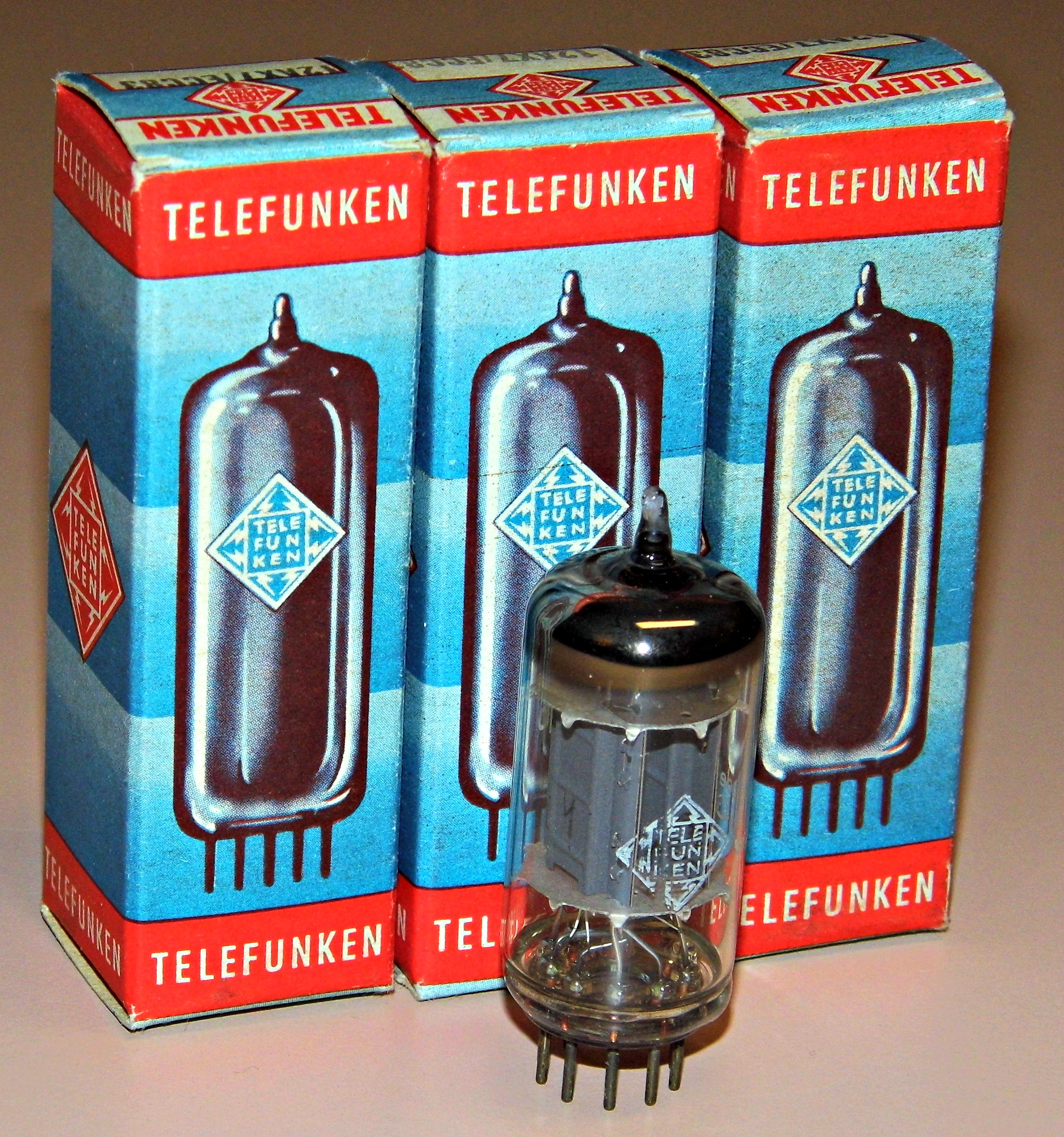 Vintage Telefunken 12AX7 (ECC83) Vacuum Tubes, Made In Western Germany